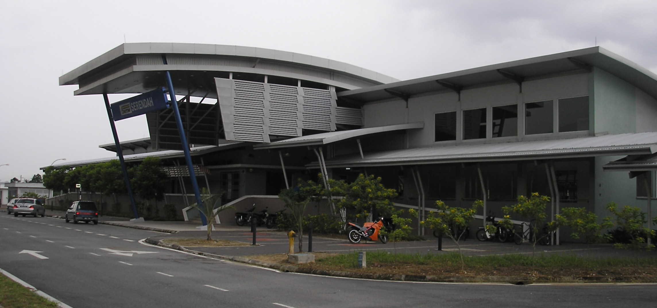 The Serendah station, near Serendah (Rasa-Rawang) (exterior), Selangor, Malaysia.